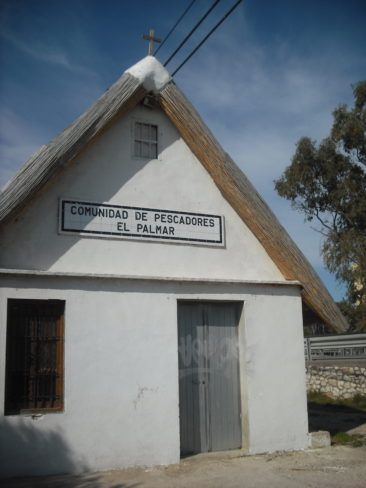 Seu de la Comunitat de Pescadors del Palmar.